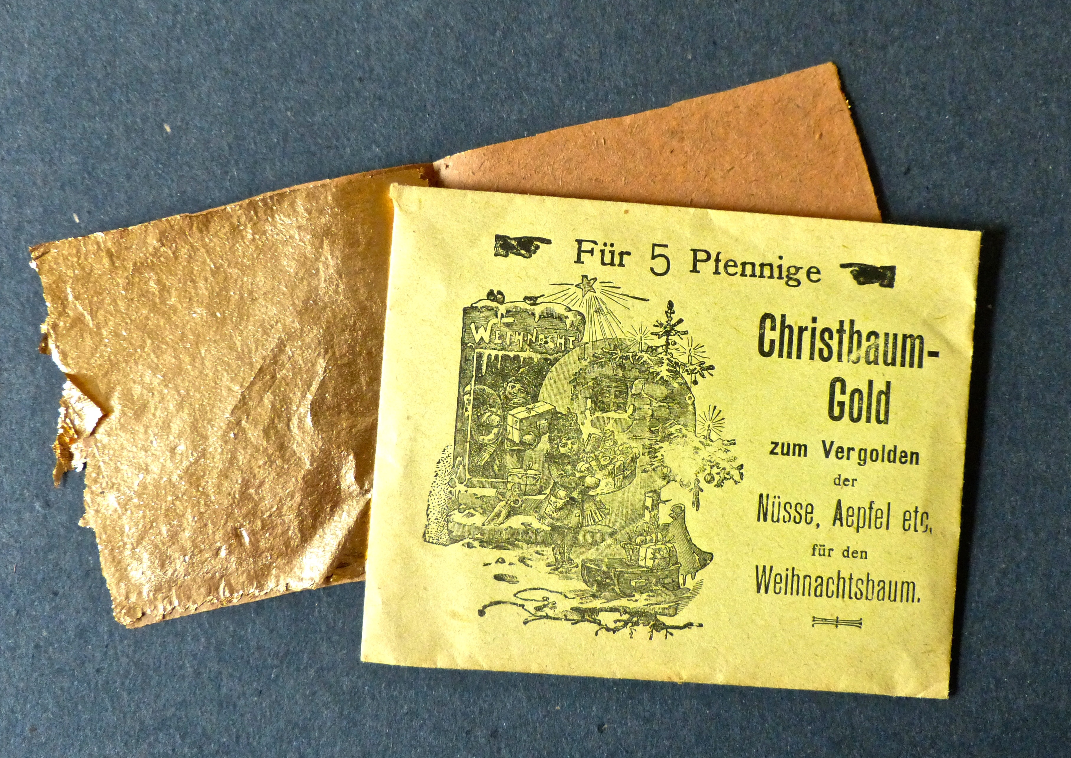 Christbaumgold zum Verzieren von Nüssen und Äpfel, Anfang 20. Jahrhundert